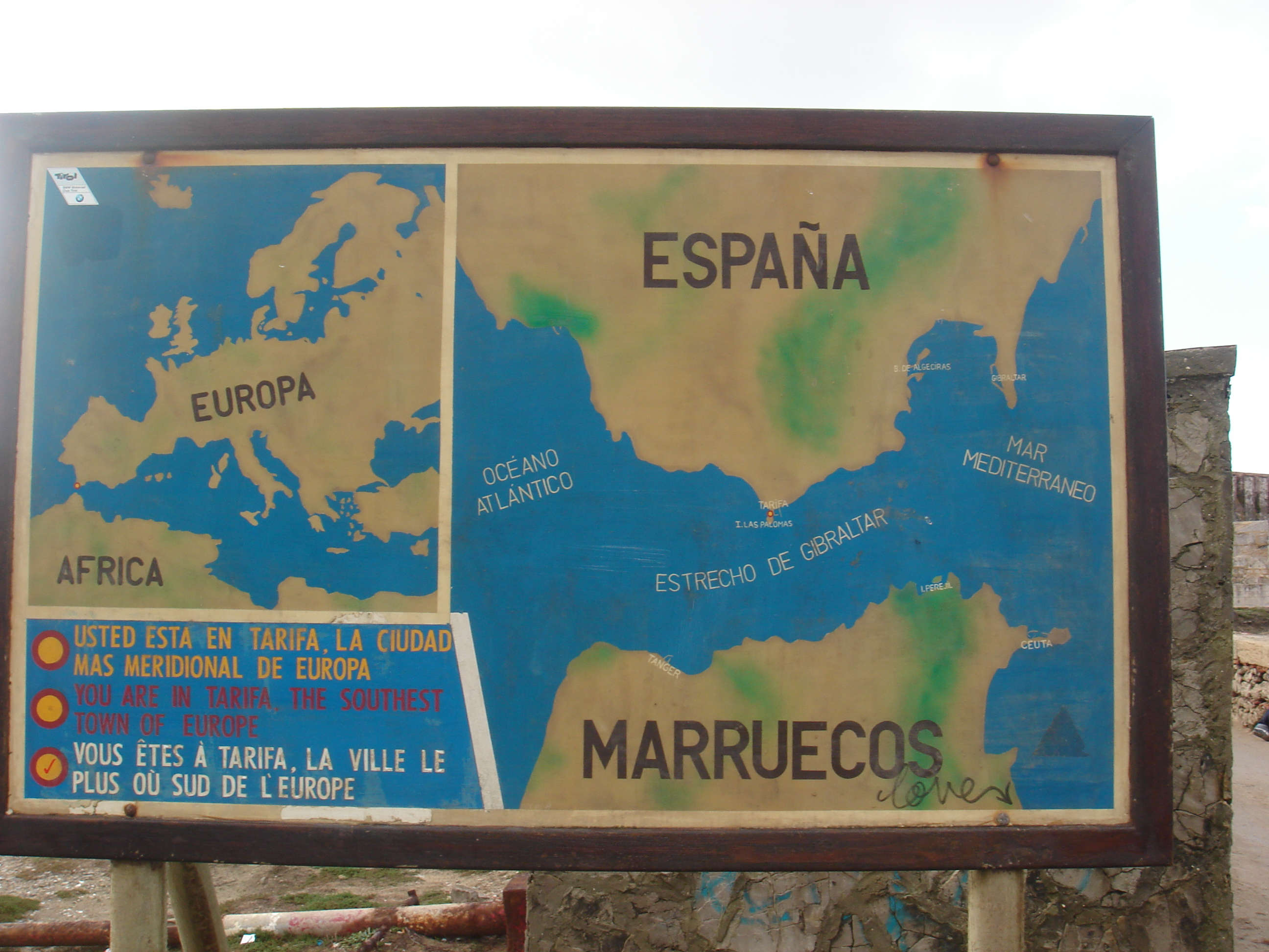 Cartel indicativo de la ciudad más meridional de Europa junto a la entrada de la Isla de las Palomas